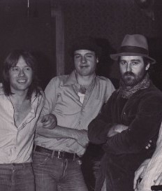 Mitglieder der deutschen Band Schoißfuaß: André Schnisa (Bass), Riedel Diegel (Mundharmonika), Alex Köberlein (Gesang), aufgenommen 1979